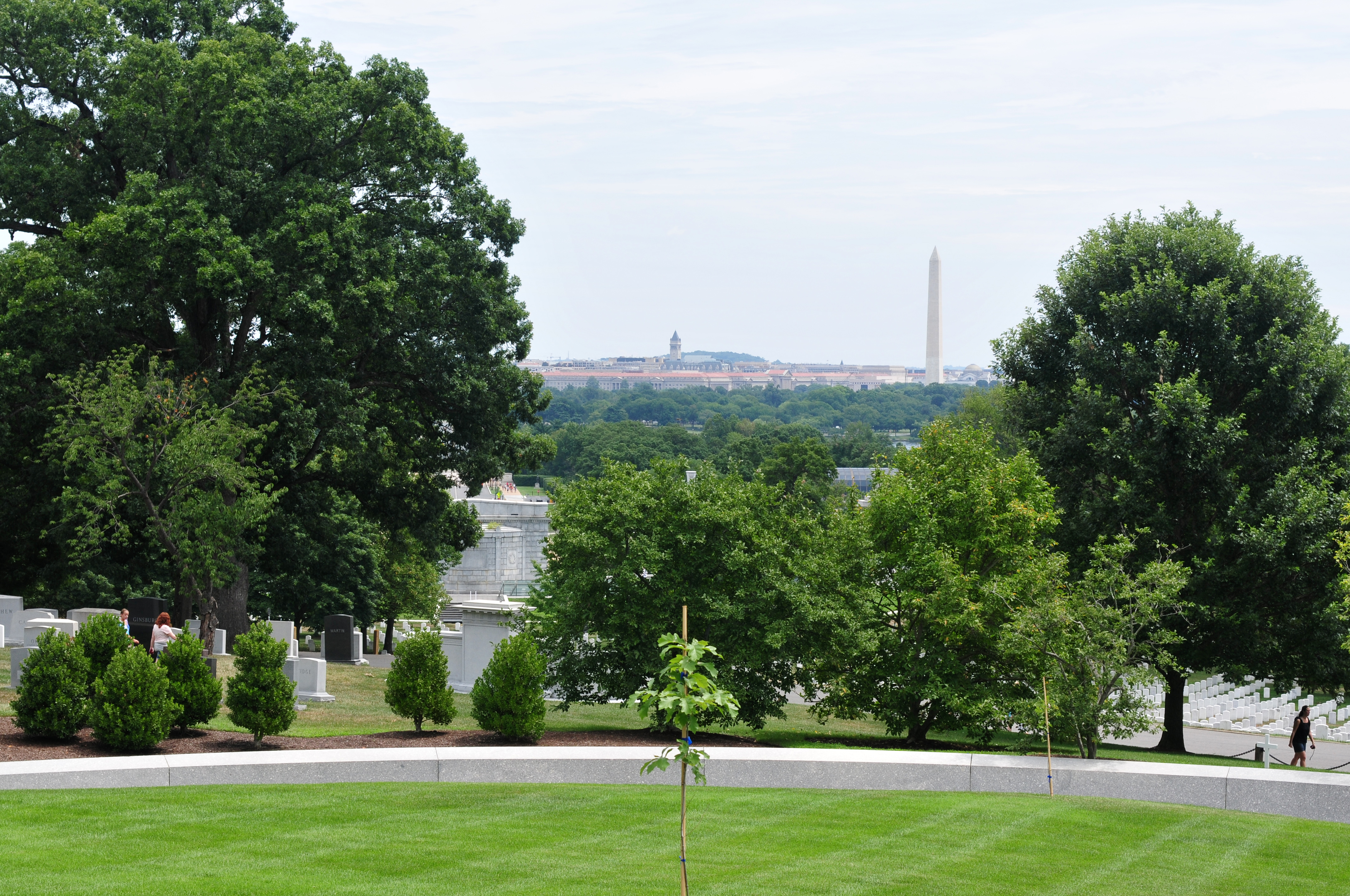 Friedhof Arlington